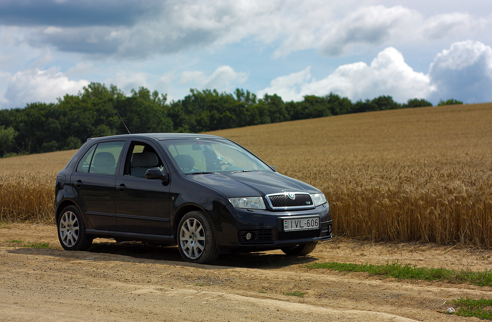 Skoda Fabia RS